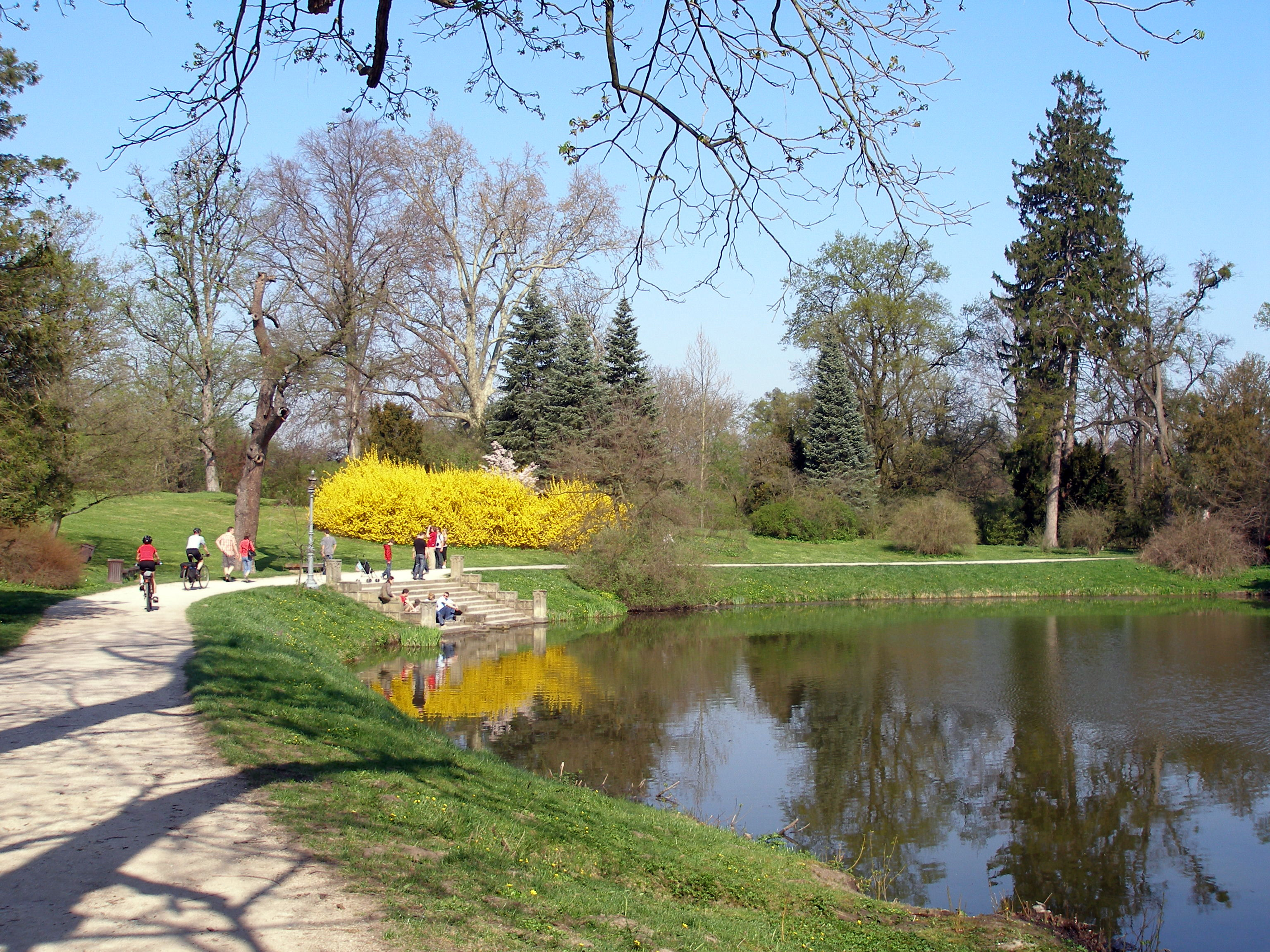 Štátny zámok Lednice na Morave Česká republika